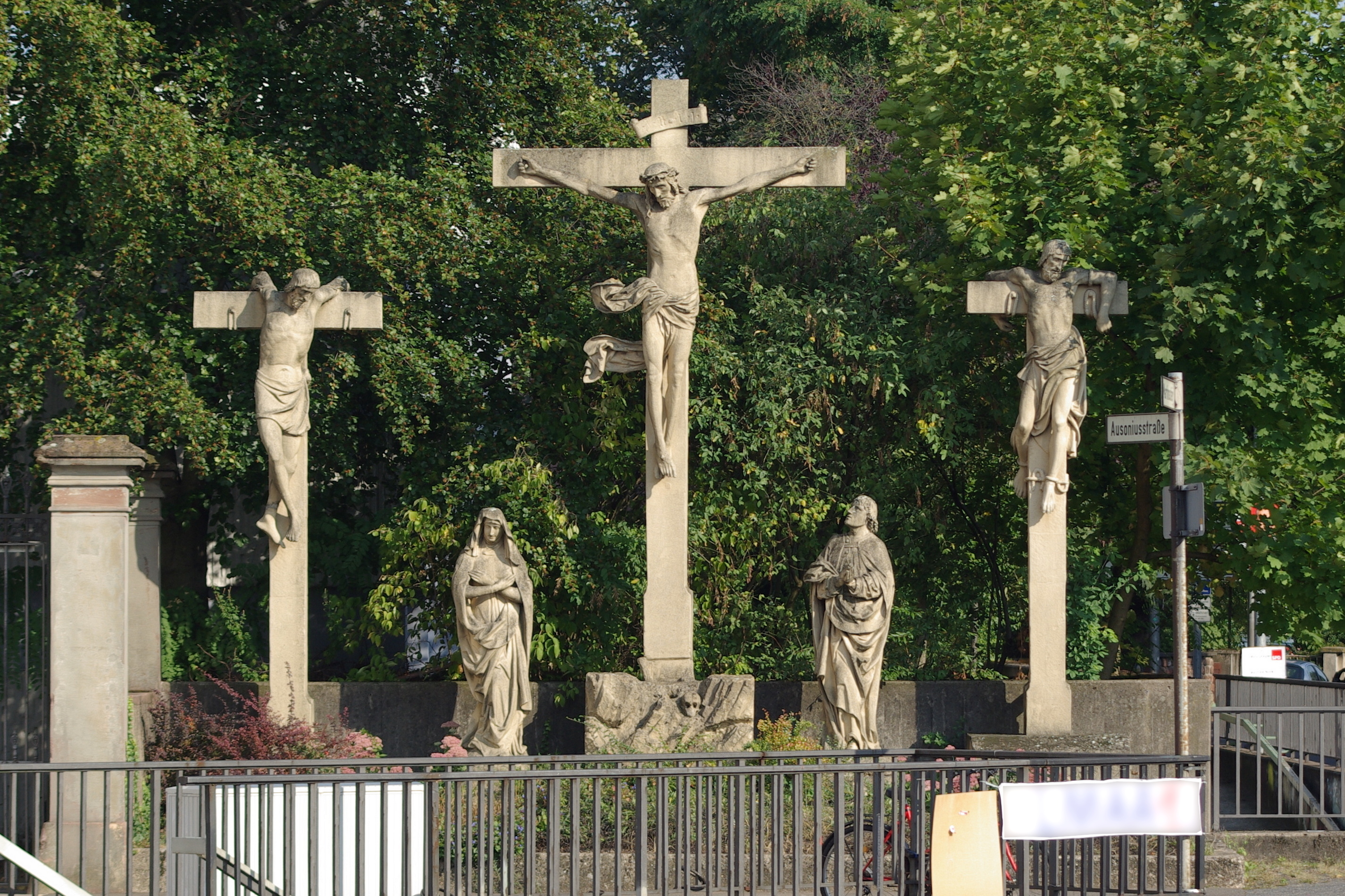 Trier, Martinskloster